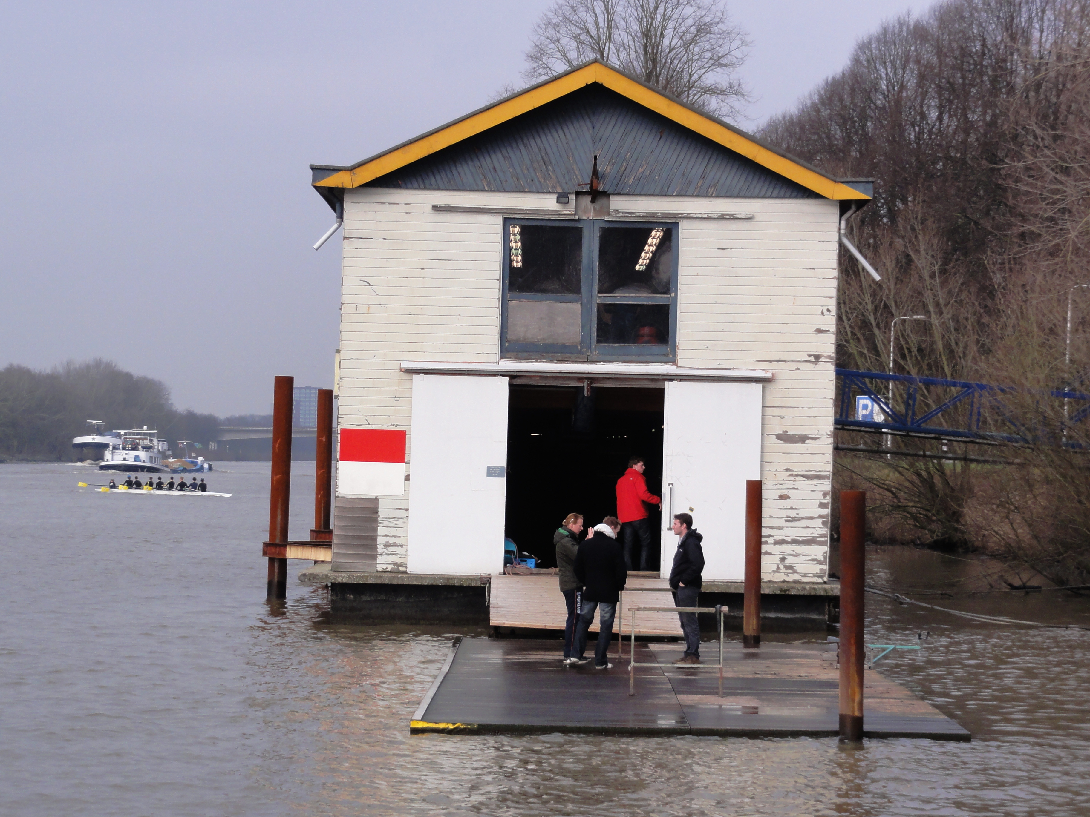 Nijmegen, Maas-Waalkanaal, botenhuis roeivereniging Phocas